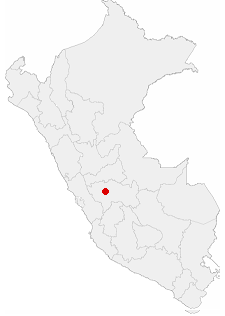 Ubicacion de Tarma en el Perú